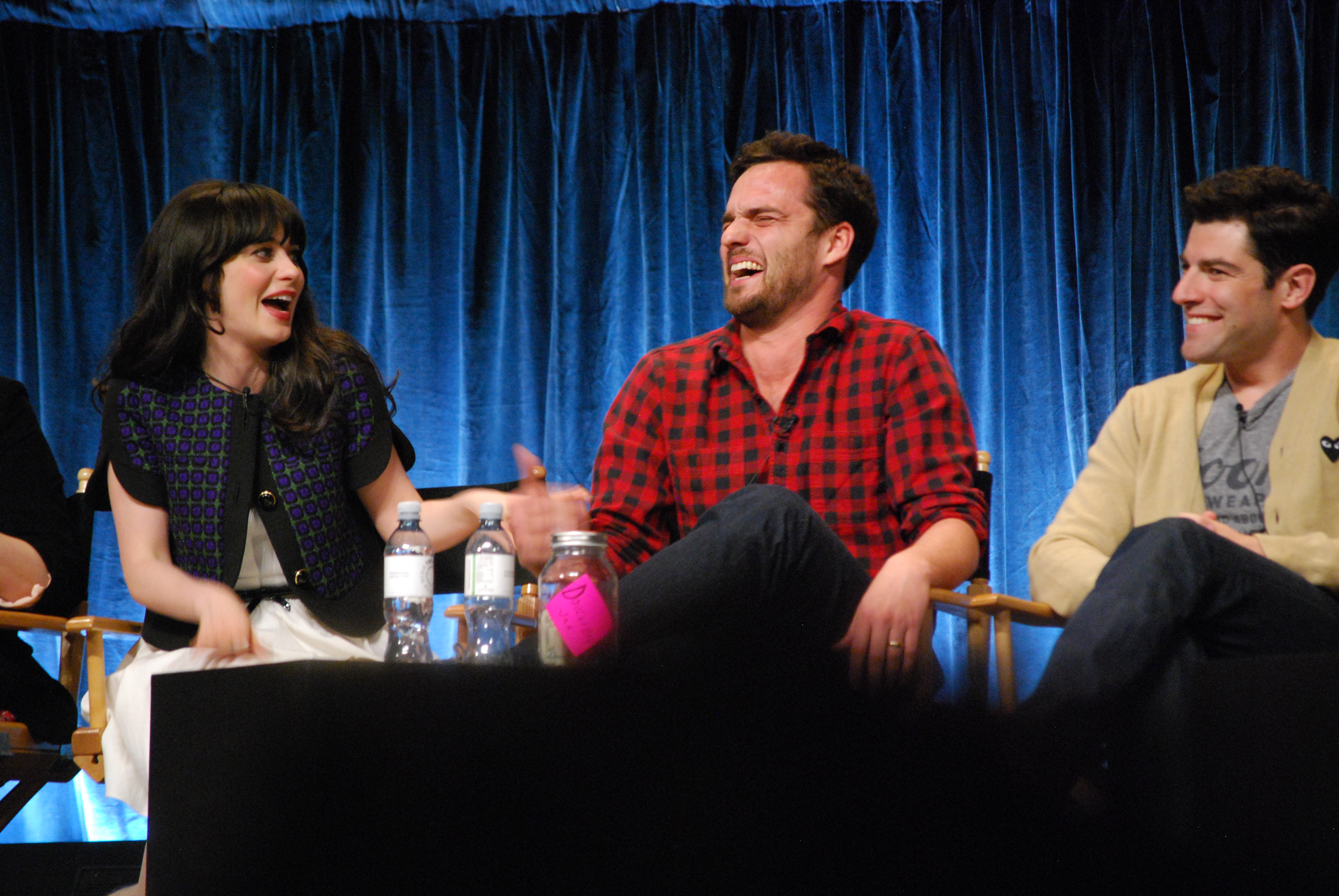 Zooey Deschanel, Jake Johnson, Max Greenfield